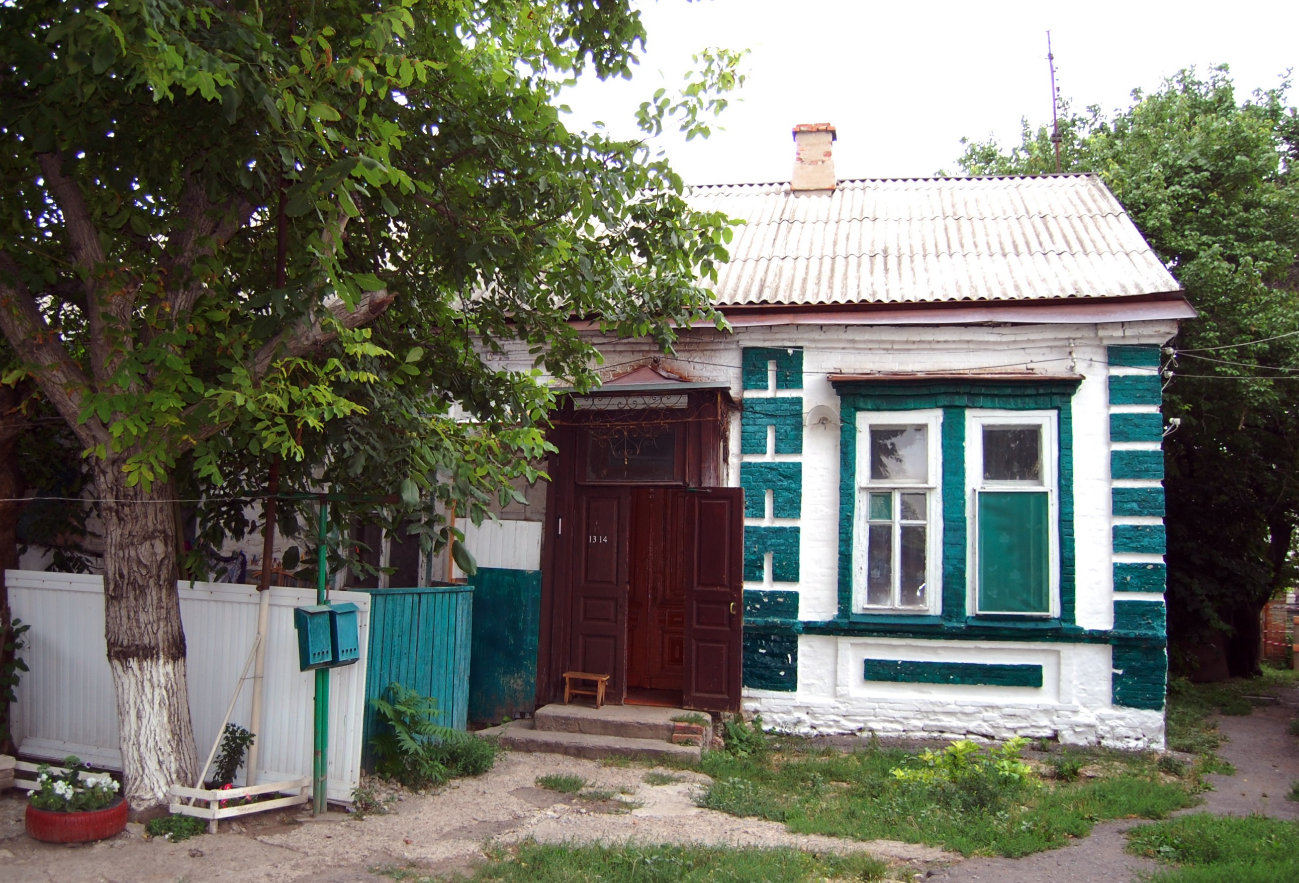 Флигель во дворе "Дома Караспасова". Таганрог, ул. Фрунзе 18